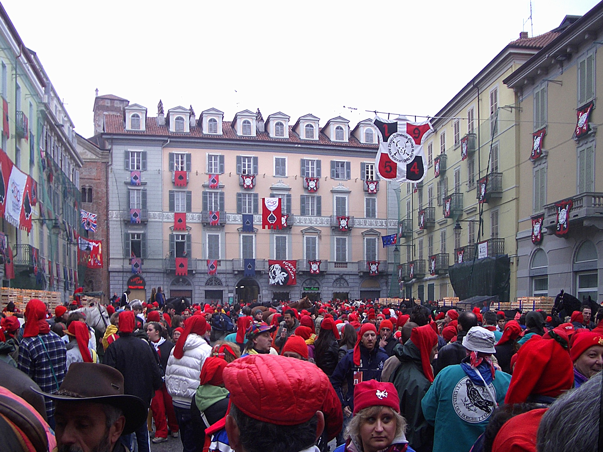 Carnival of Ivrea, Piazza di città a Carnevale (Town-hall square at carnival time)